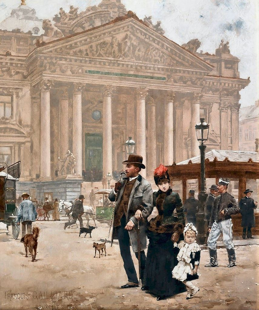 François Gailliard, Devant le Palais de la Bourse, 1885